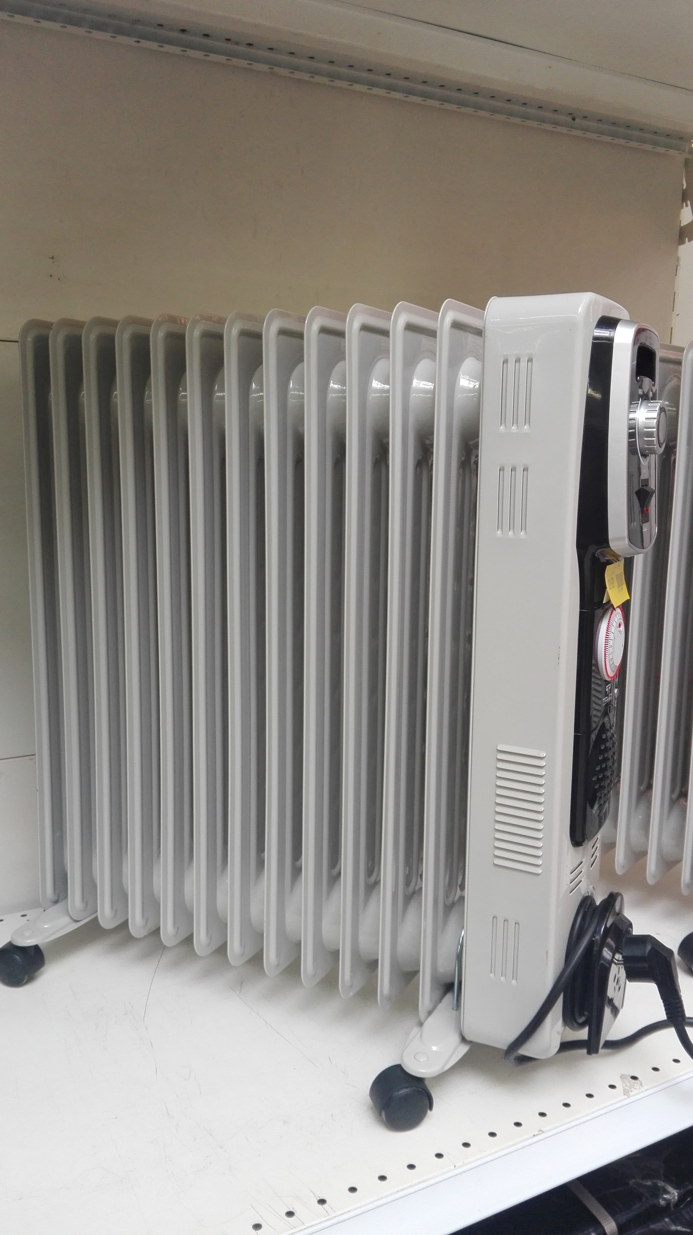 دفاية زيت بأحد المحال التجارية.